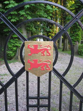 Wapen van Wisch op de toeganspoort naar het kasteel (Terborg)